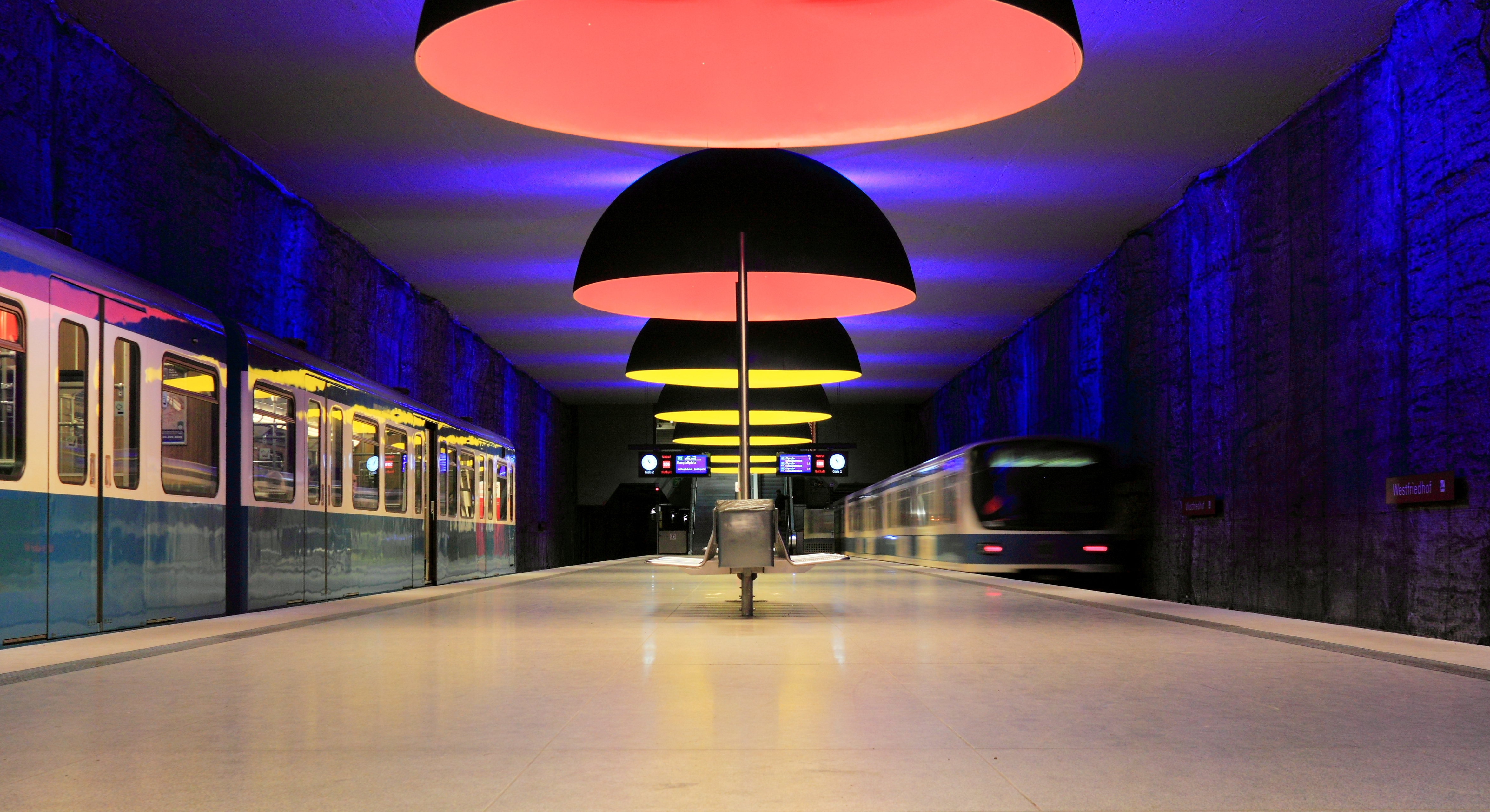 U1 München Westfriedhof.